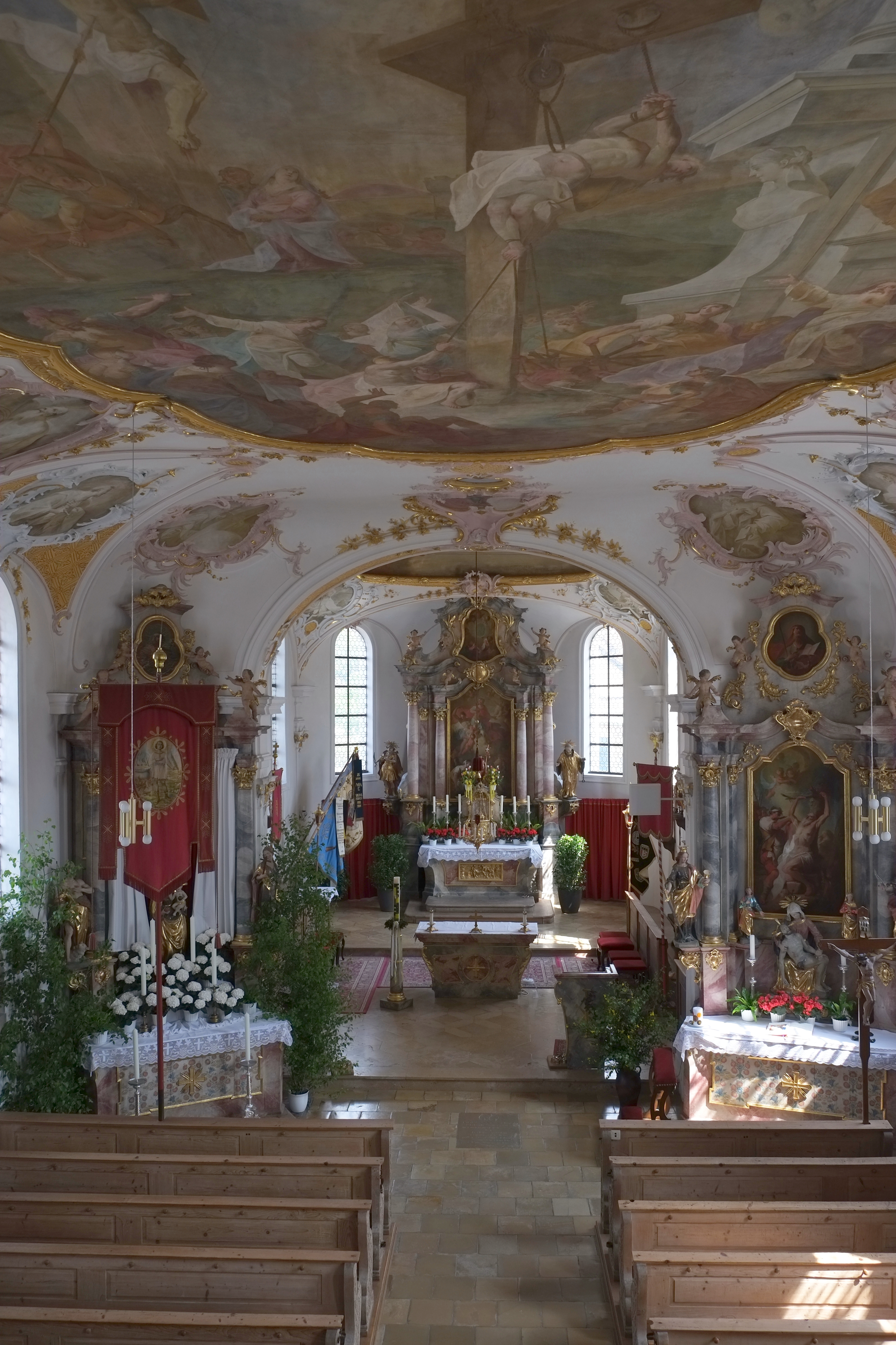 Kirche St. Vitus in Steinekirch im Landkreis Augsburg (Bayern, Deutschland)